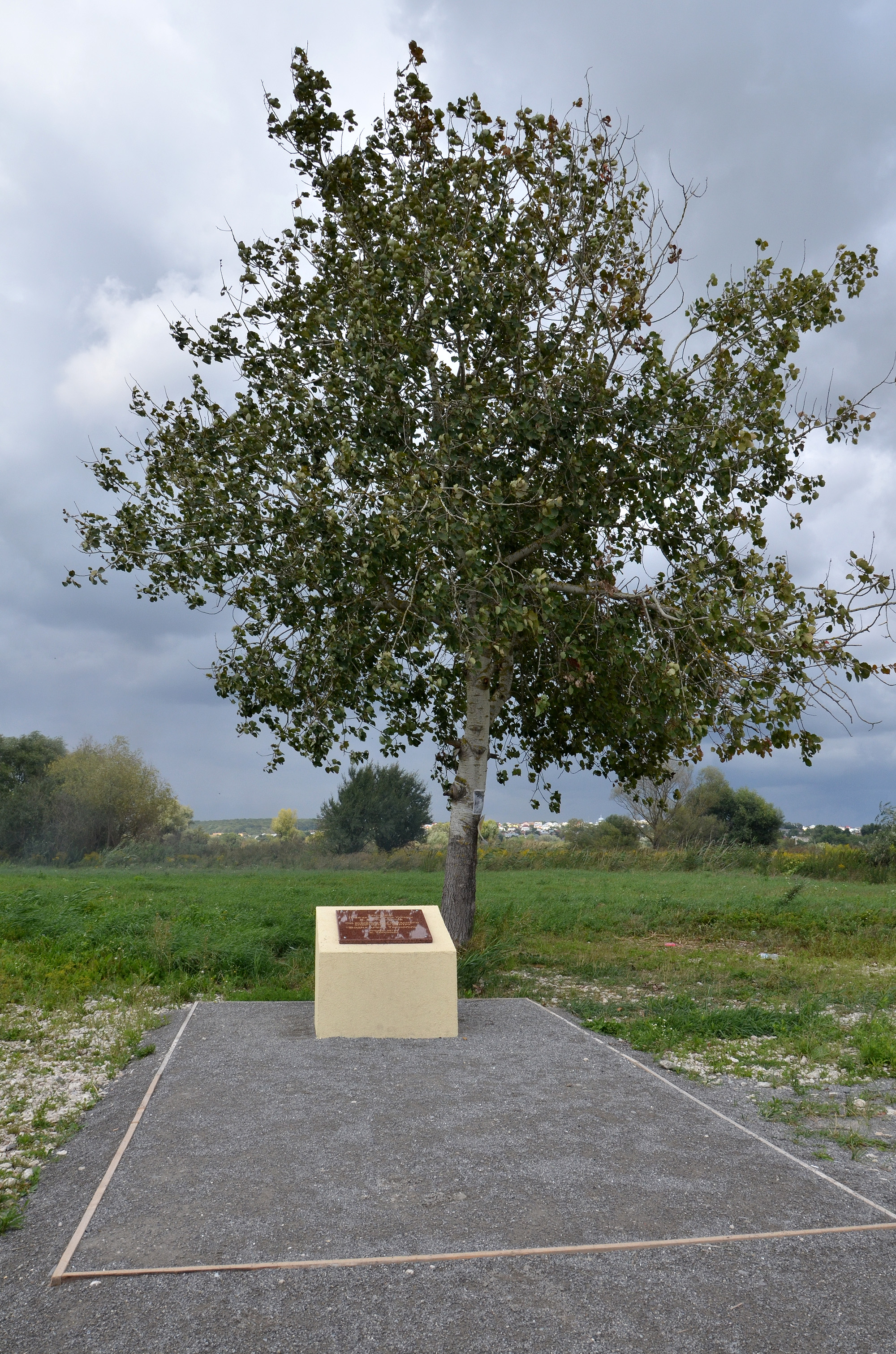 Капсула під будівництво «Водної арени Тернопіль», яку заклав під час свого візиту в Тернопіль 21 липня 2017 року прем'єр-міністр України Володимир Гройсман поблизу Веслувального каналу на Тернопільському ставі.